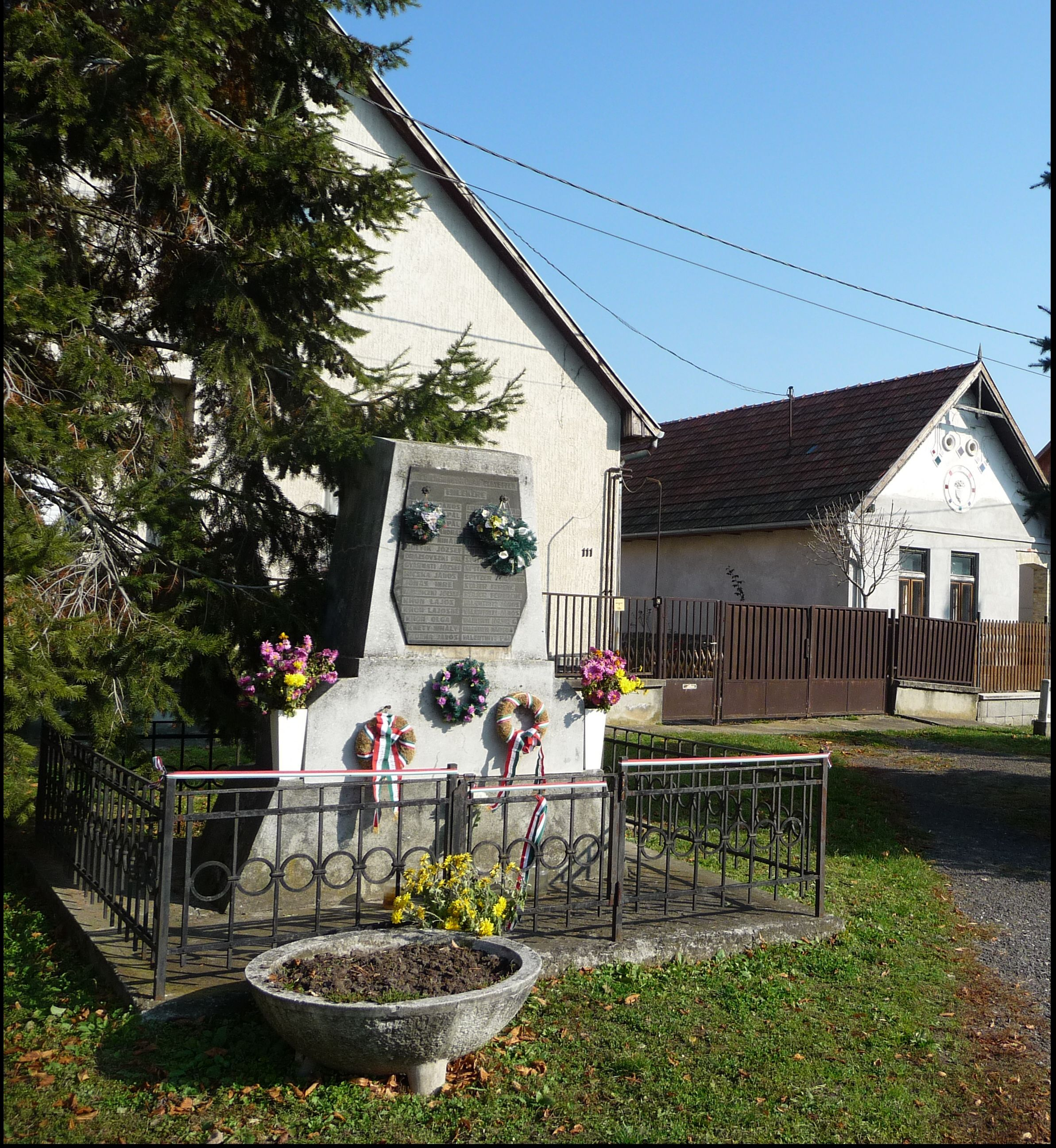 II. világháborús emlékmű Domonyban